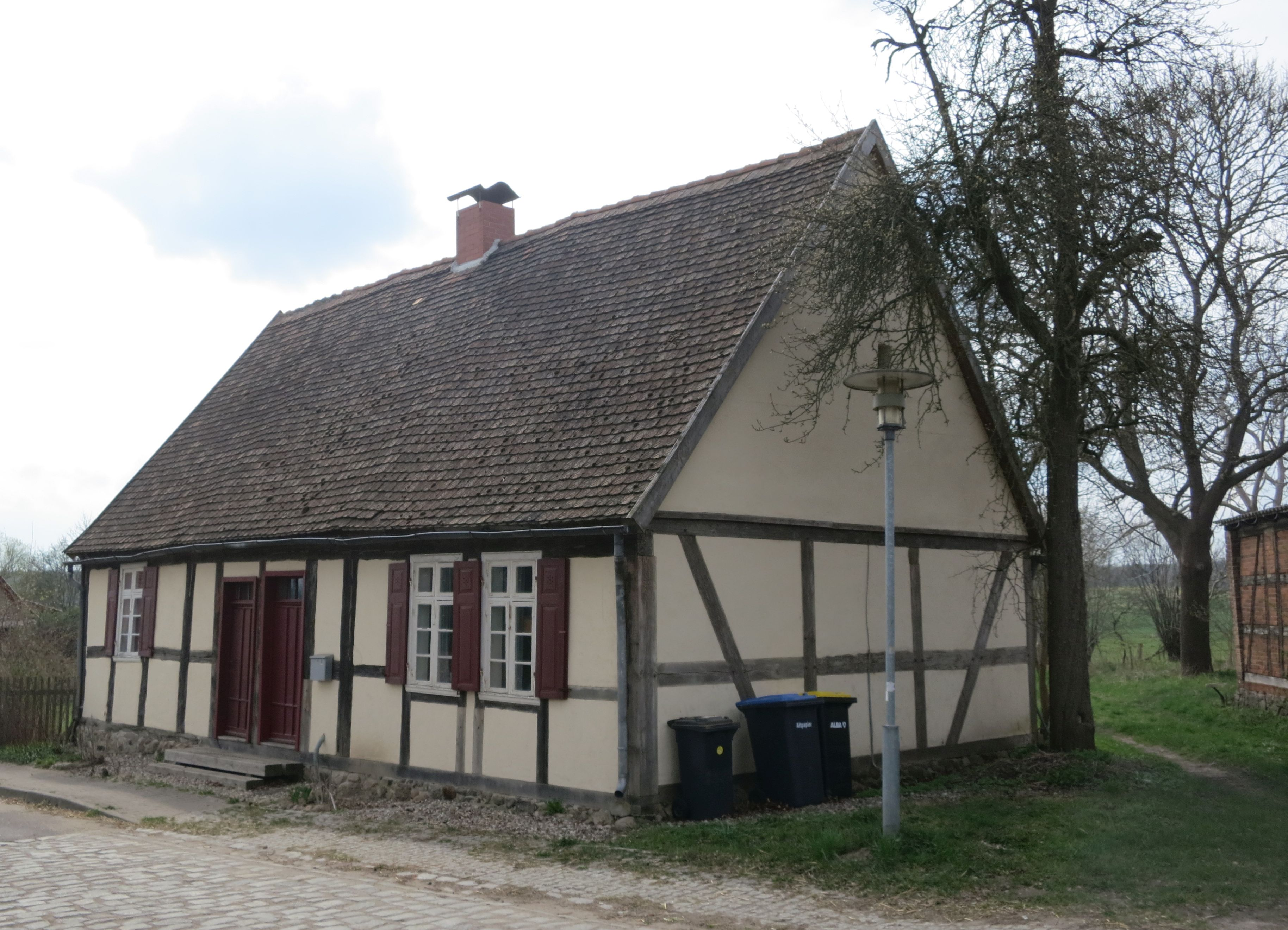 Lindenhagen, Gemeinde Nordwestuckermark, Wohnhaus Sternhagener Str2 Baudenkmal